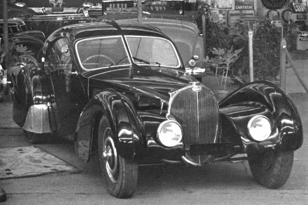 Bugatti Type 57 Atlantic châssis n°57453 en 1937